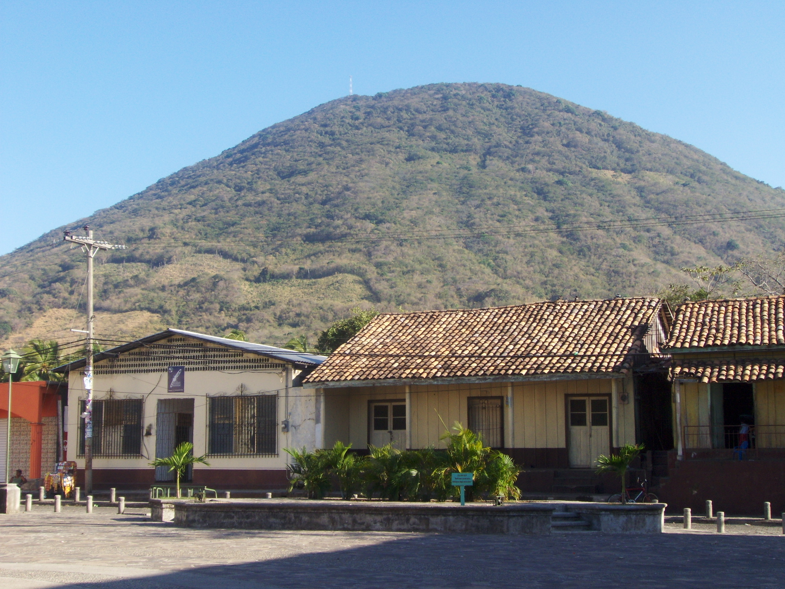 Vista del volcan de la Isla de El Tigre desde la plaza central de Amapala